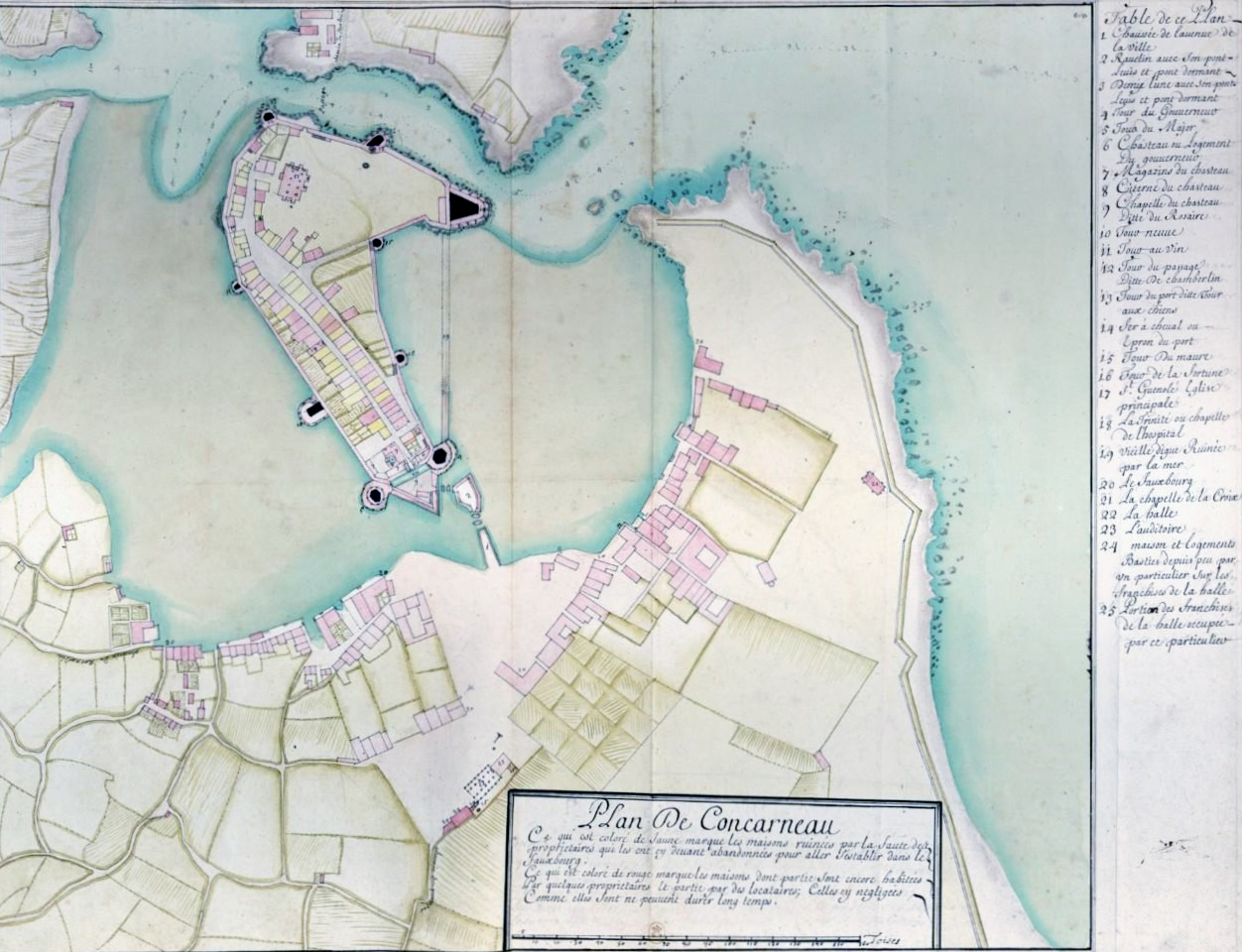 Plan de Concarneau au XVIIIème siècle, date et auteur inconnus